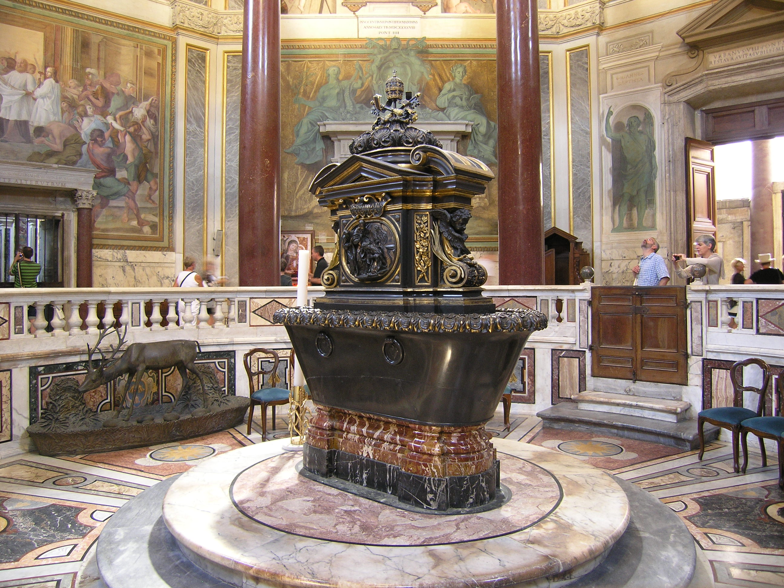 Innenansicht der Taufkapelle der Lateransbasilika in Rom.